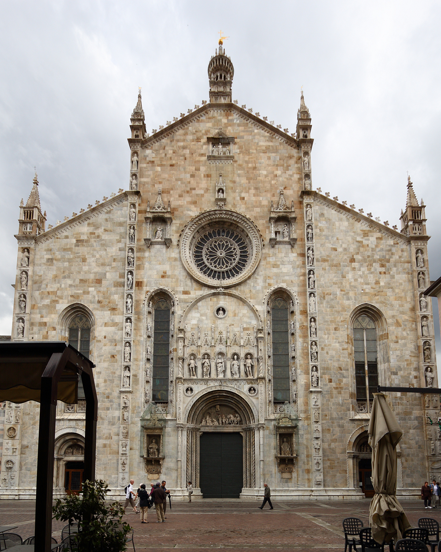 Como - Dom